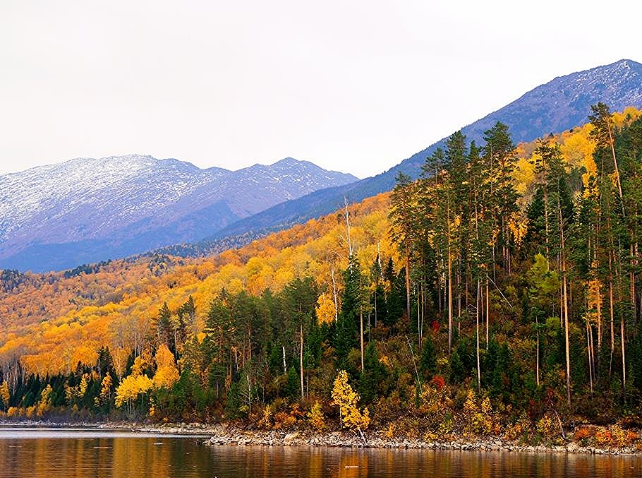 Национальный парк "Шушенский бор" характеризуется богатсвом лесорастительных зон.